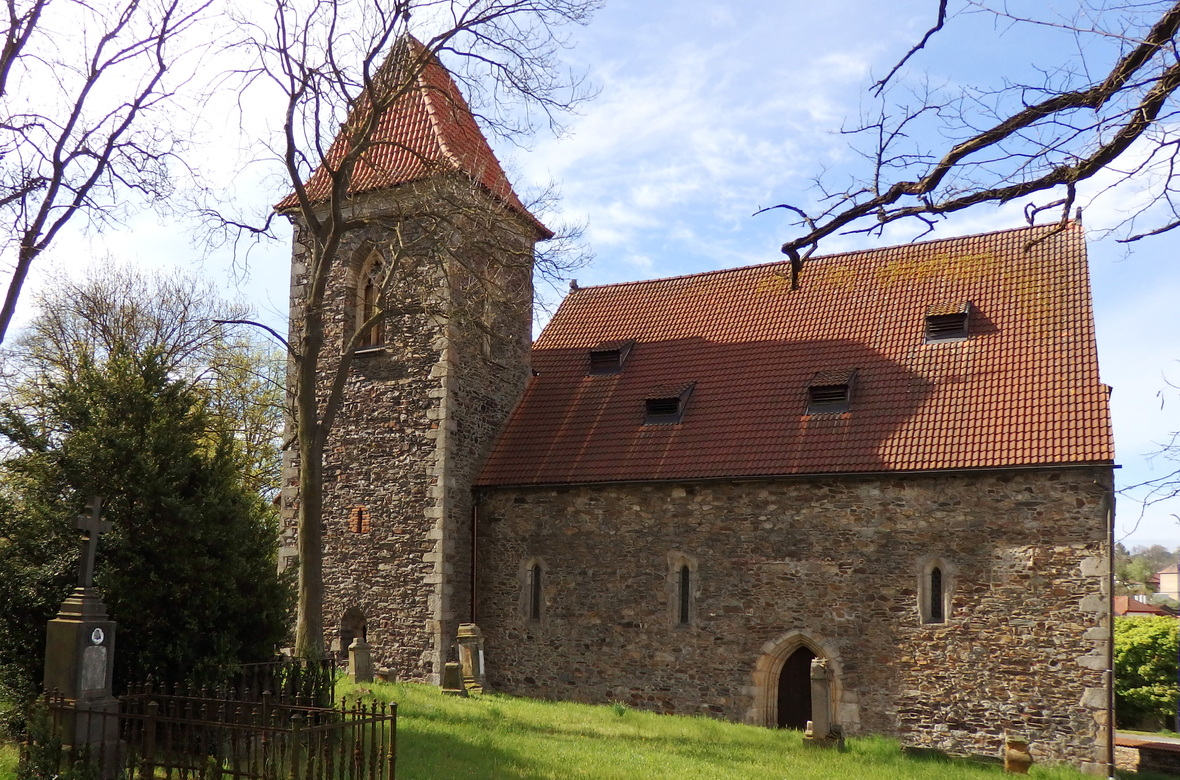 Kostel U Svatých v Domažlicích, pohled severní